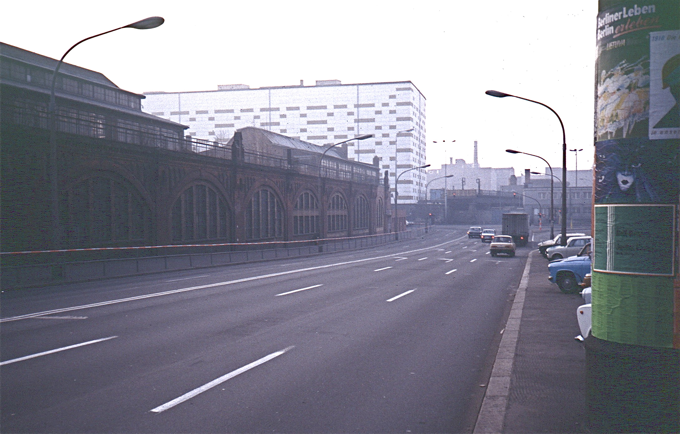 "Tote" U-Bahn an der Warschauer Straße 1988